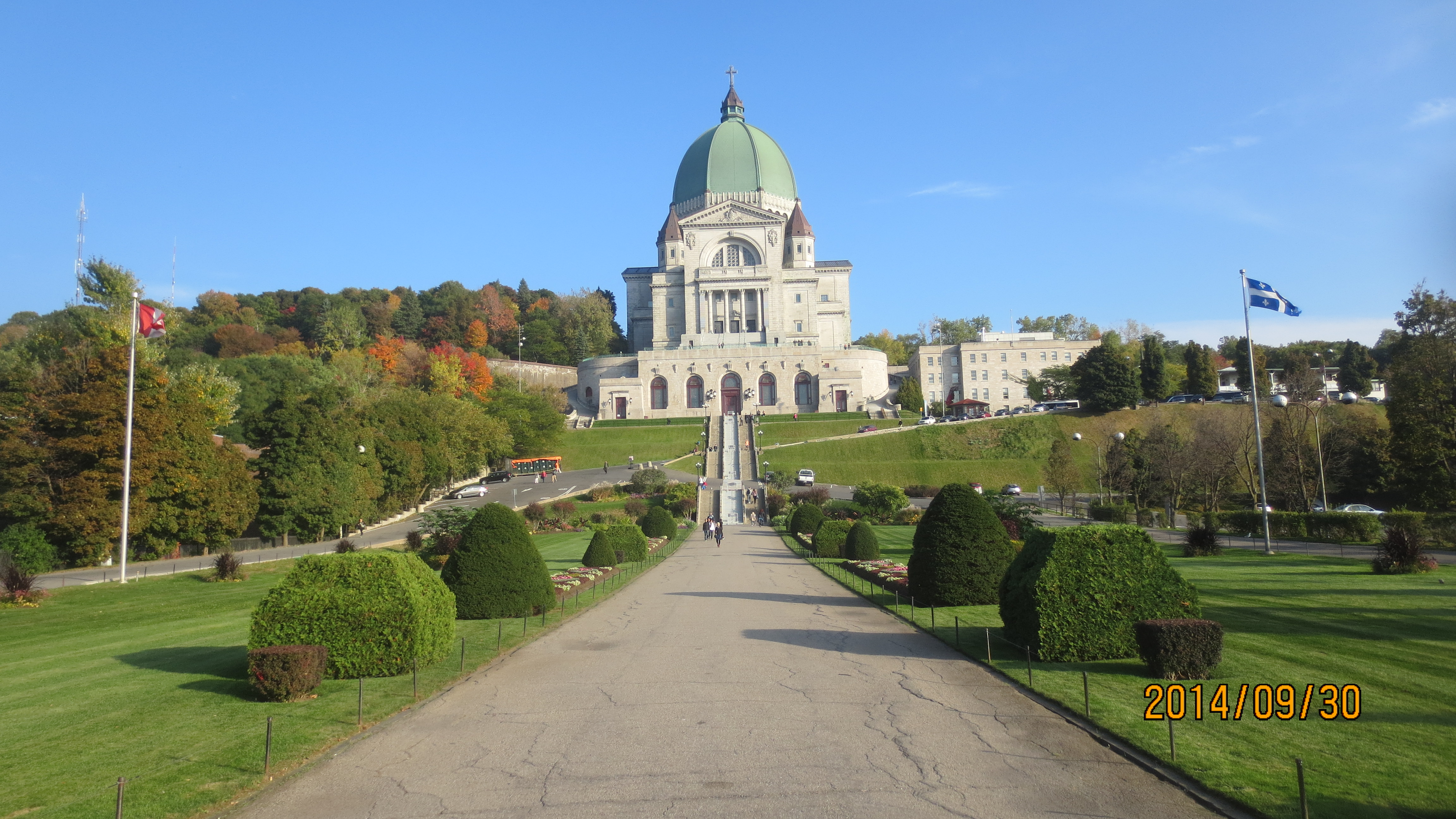 كليساي سن ژوزف